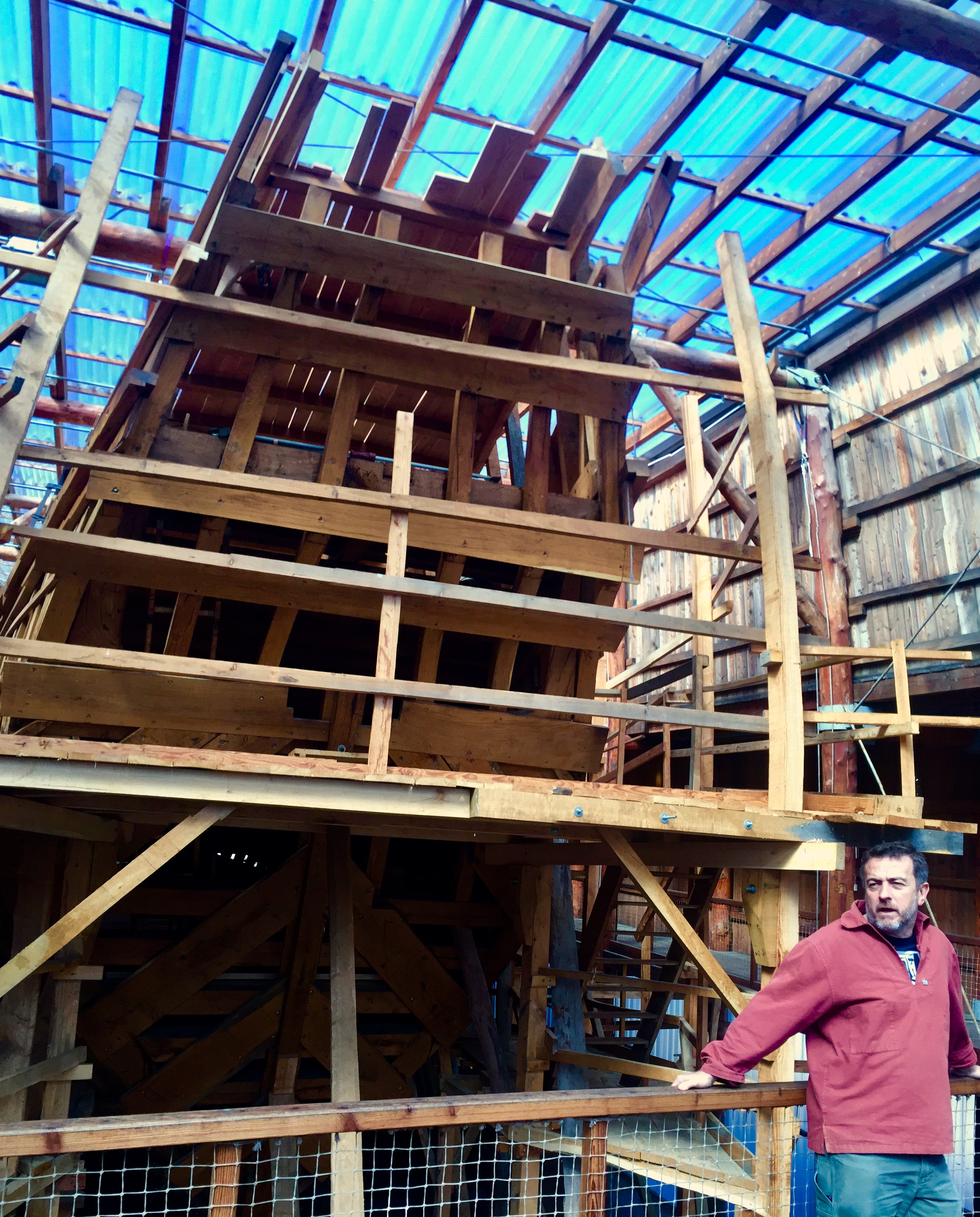 Xabier Agote, Albaola faktorian